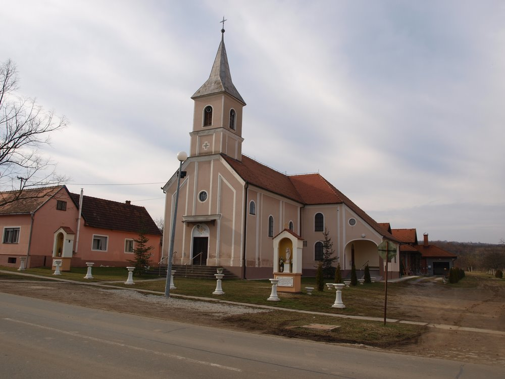 Crkva u Brodskom Stupniku, Brodsko-posavska županija.